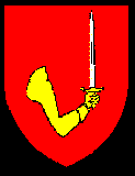 Blason originel de la famille de Lastours